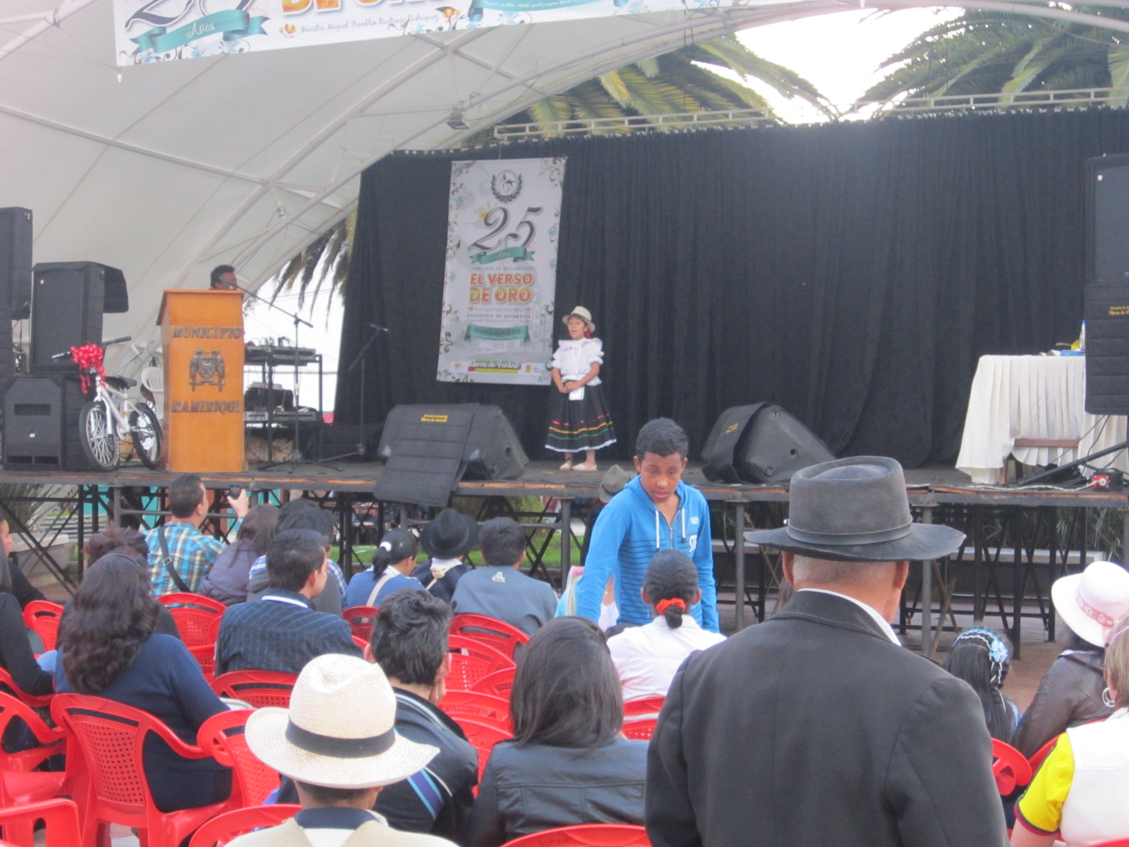 Niña declamando en el festival de poesía "El Verso de Oro".